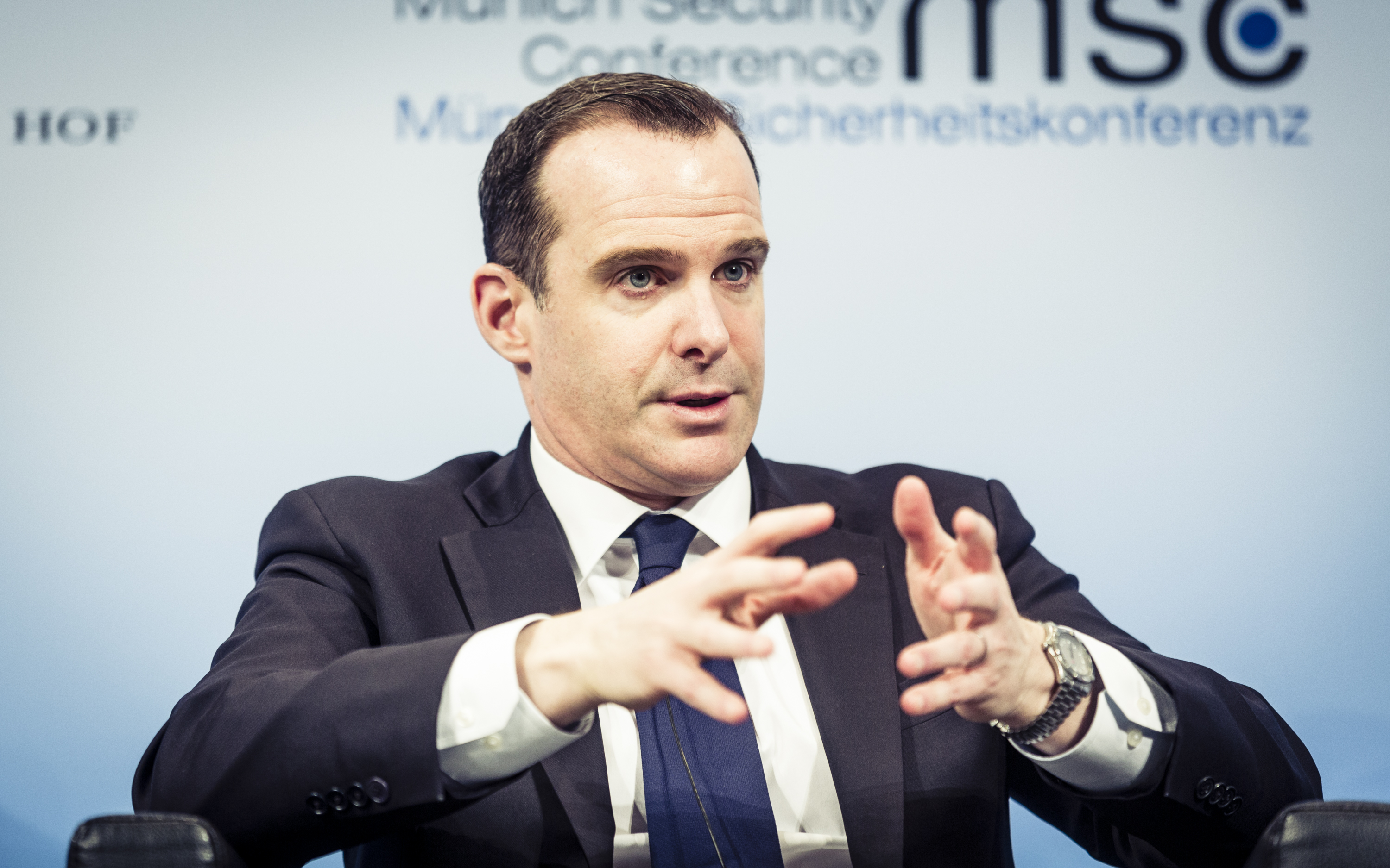 Brett McGurk während der Münchener Sicherheitskonferenz 2017